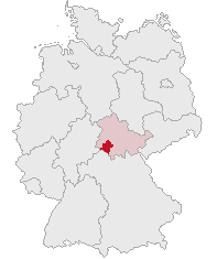 Landkreis Schmalkalden-Meiningen, Thuringia, Germany